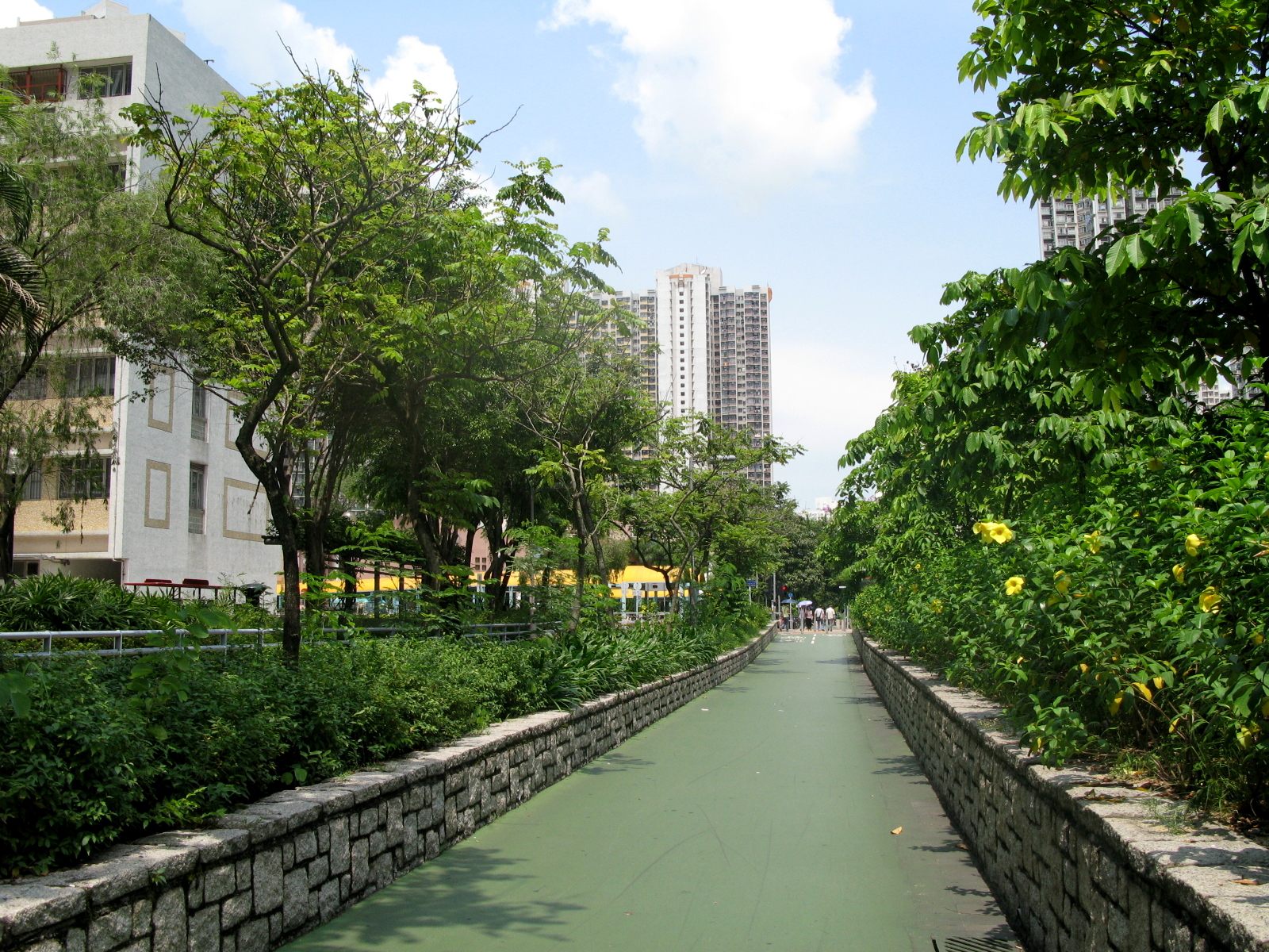 Tin Shui Wai Cycling Path 天水圍新市鎮內的zh:單車徑